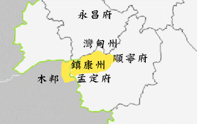 鎮康州鄰近勢力